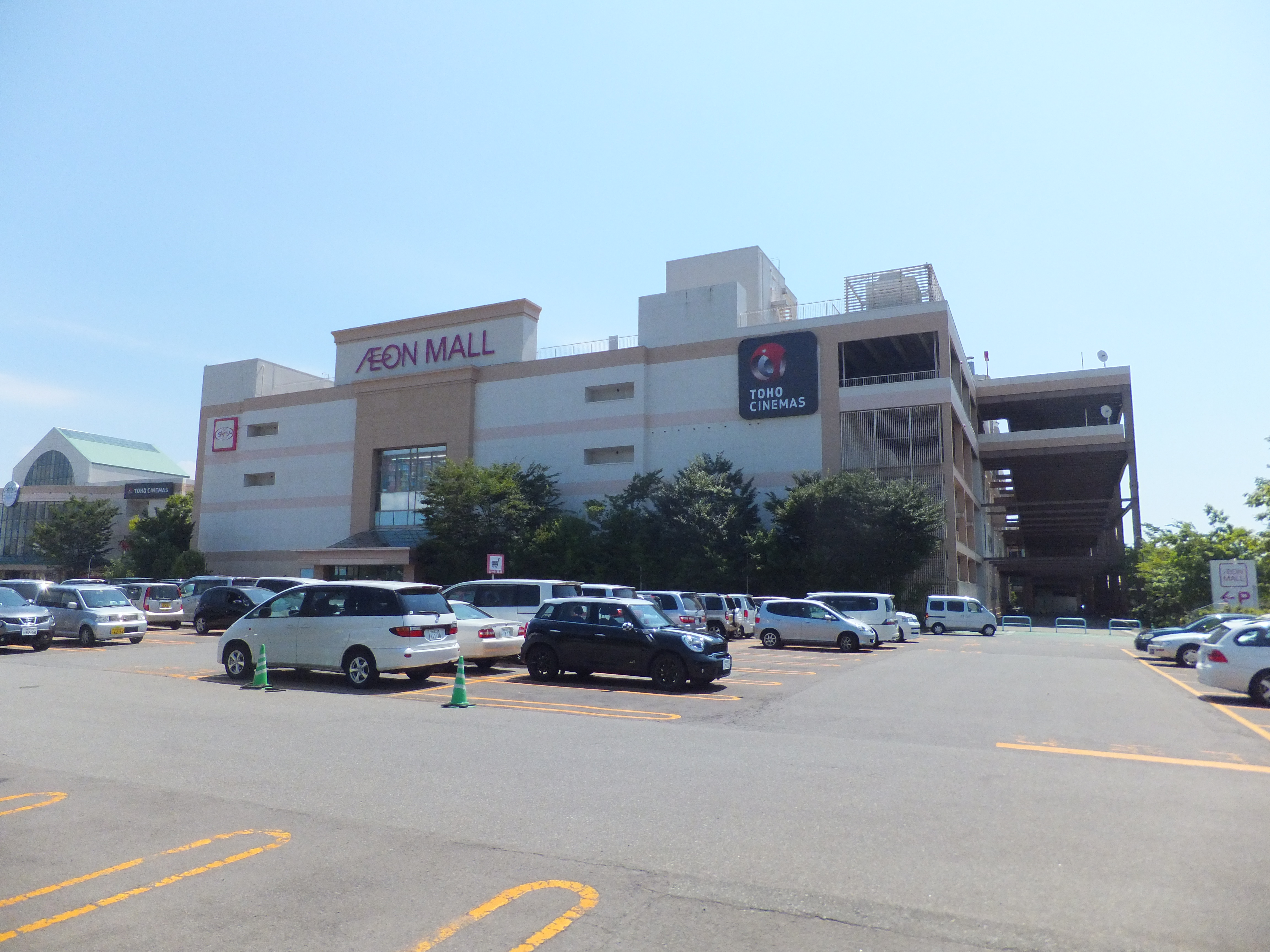 イオンモール秋田、ウェストモール